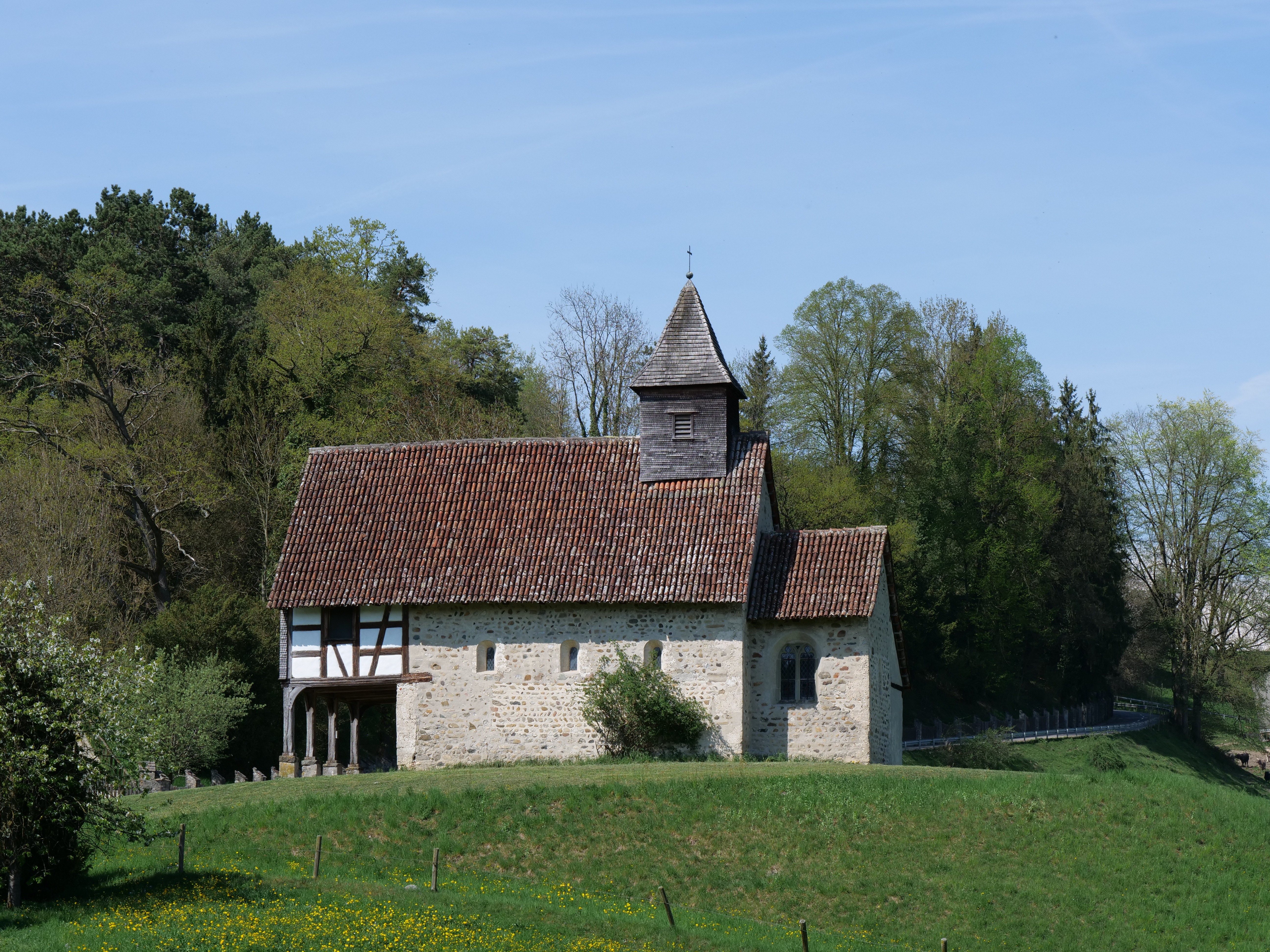 Südseite der Kapelle St. Nikolaus und St. Magdalena